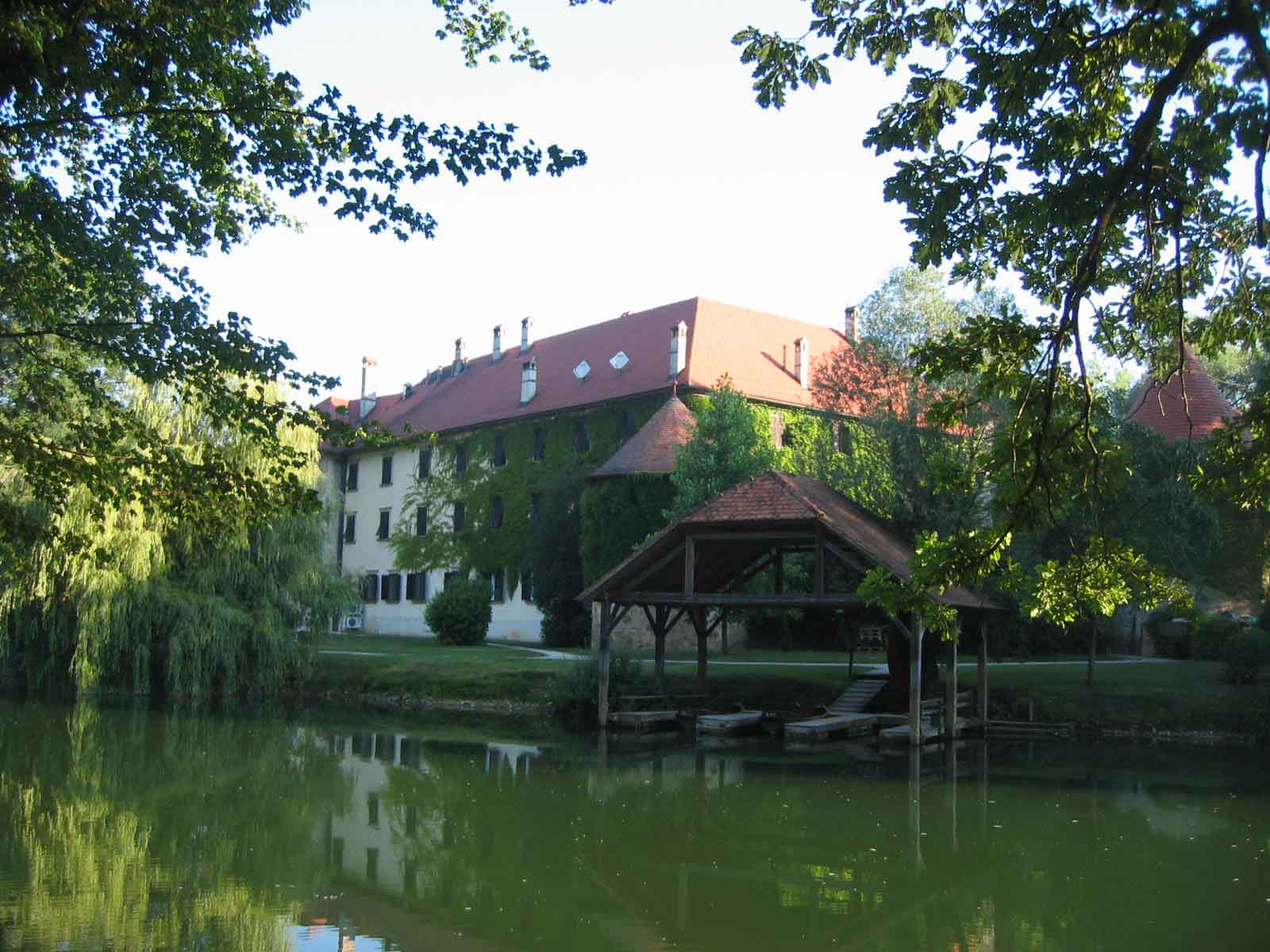 Otočec, at Krka river, Slovenia photo:Ziga 08:05, 2 April 2007 (UTC)